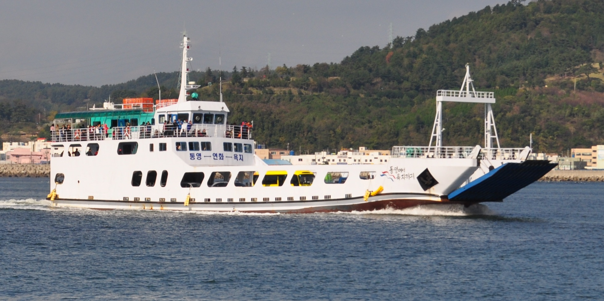 통영-연화-욕지도를 운항하는 욕지아일랜드호